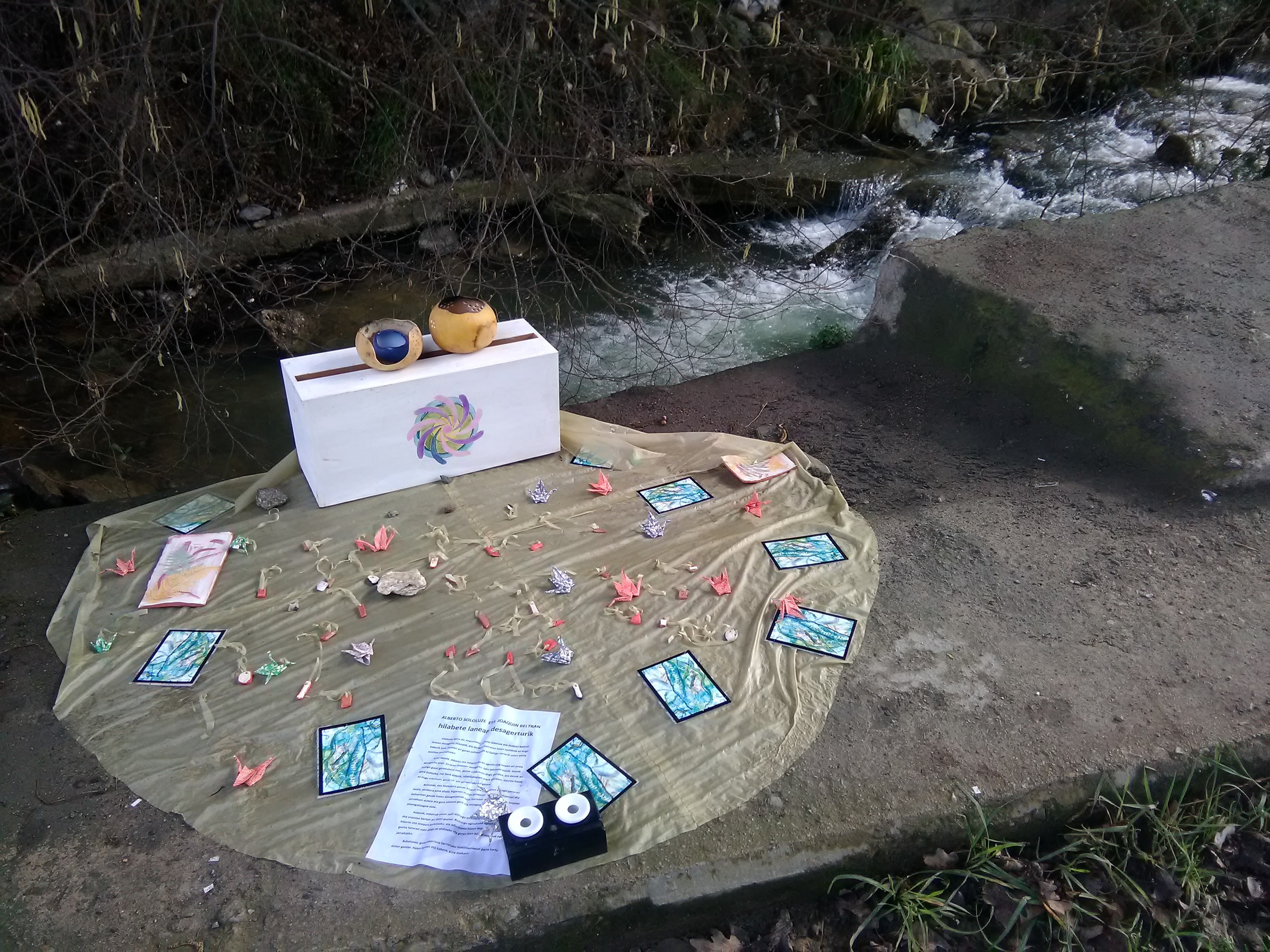 2020ko otsailaren 6an, Zaldibarko Verter Recycling zabortegian izandako luizietan desagertutako bi beharginen senideek ezarritako eskaintzak